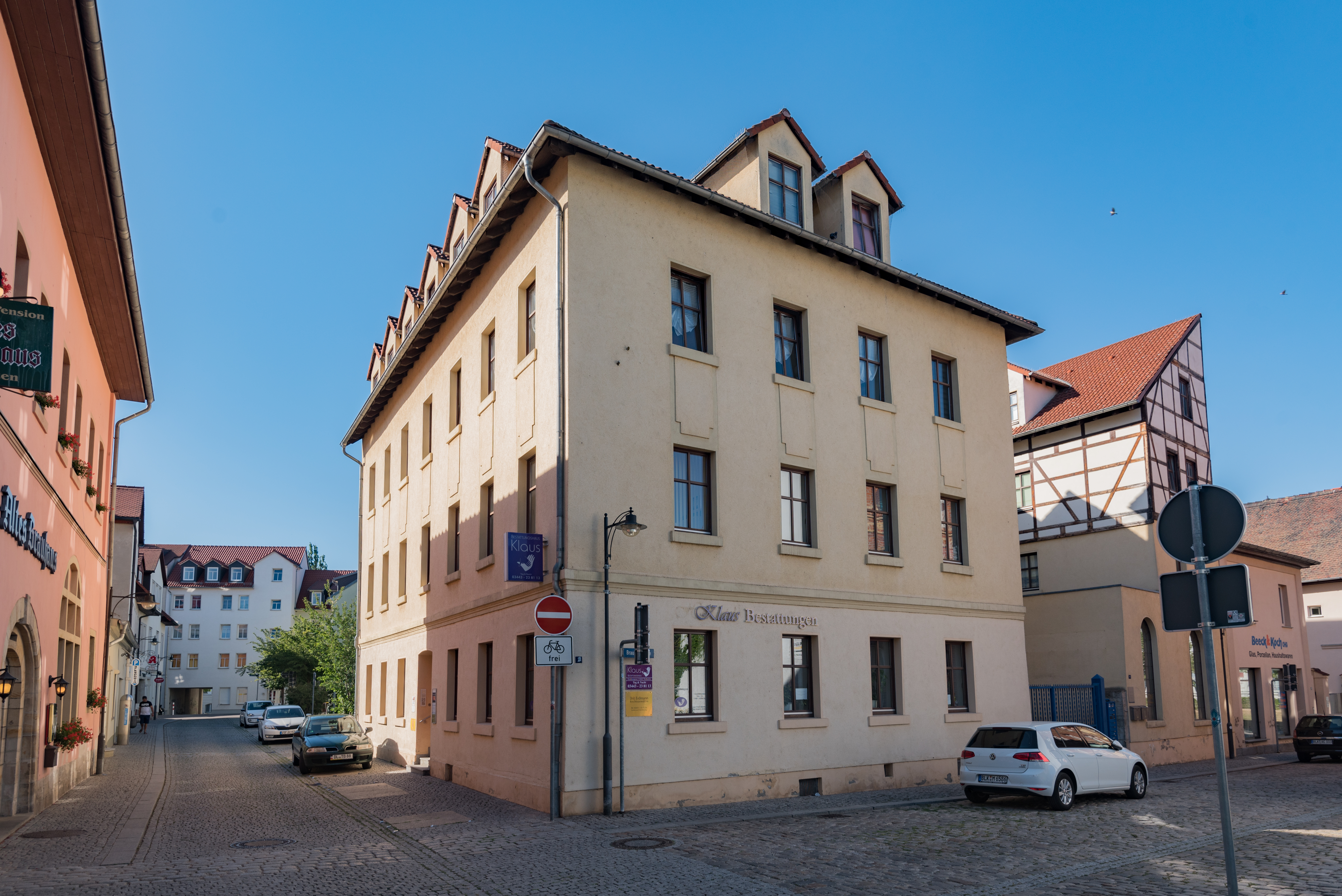 Weißenfels, Brauhausgasse 2